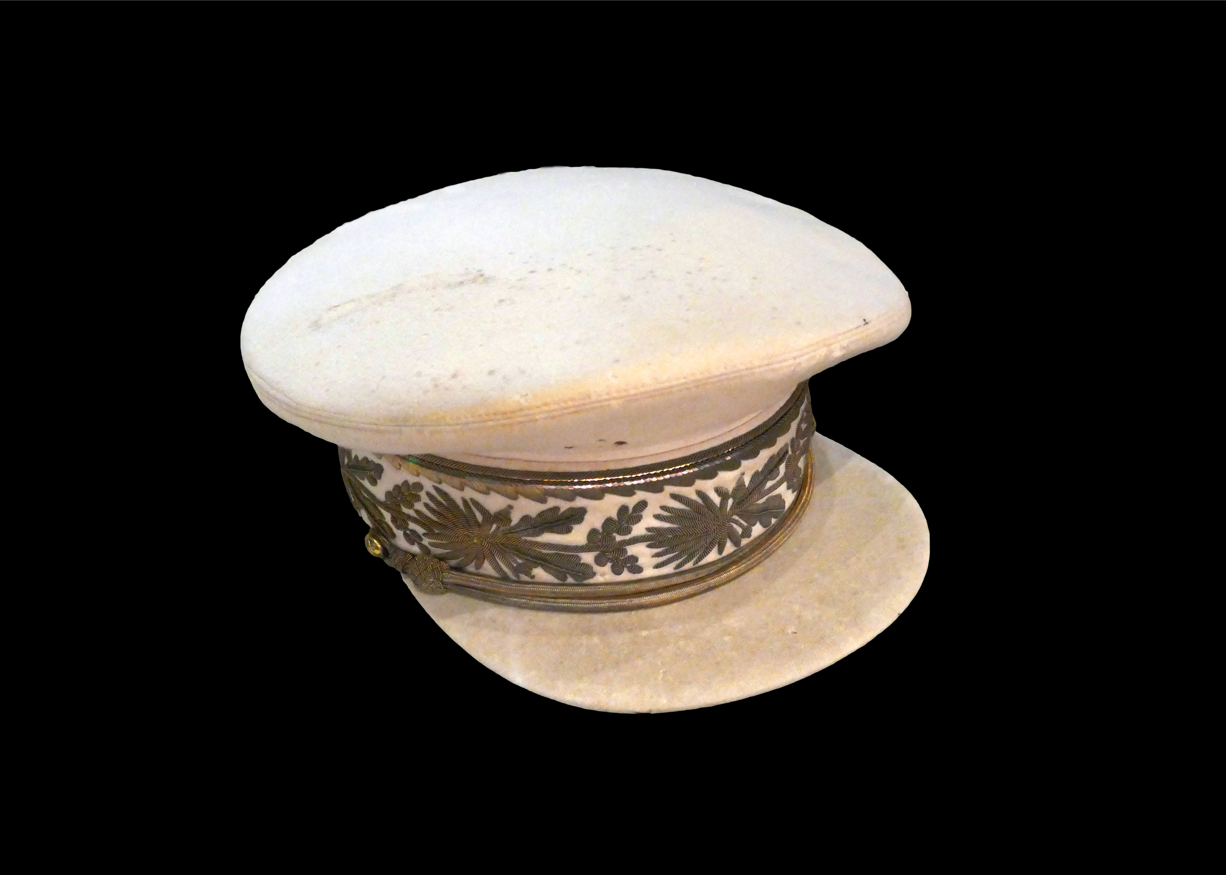 Képi du gouverneur général Pierre Ryckmans Belgique, avant 1946 Africa Museum, Tervuren, n° HO.1993.55.3 Don P. Ryckmans, 1990